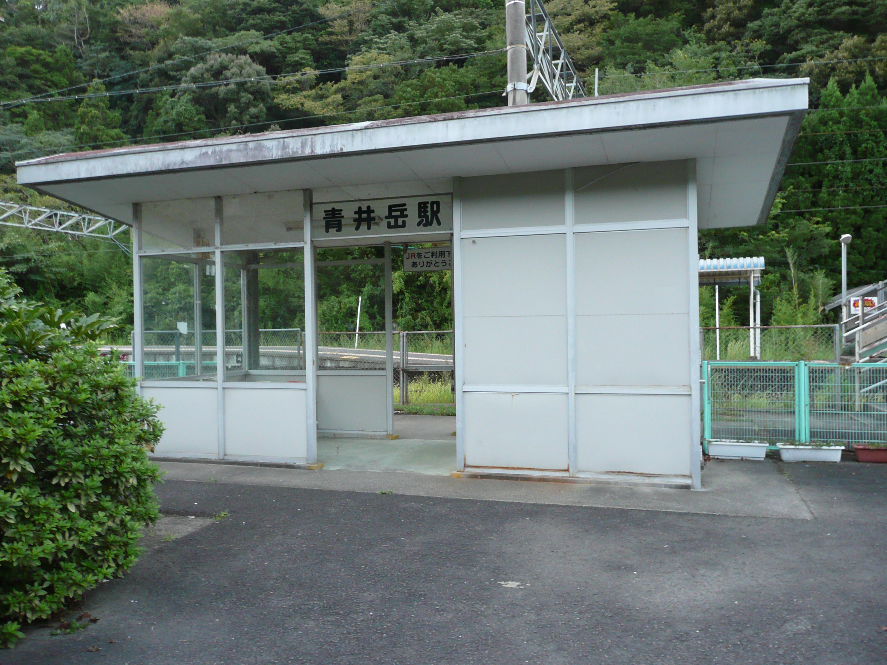 2007/9/2 日豊本線・青井岳駅の駅舎 撮影&投稿者:Sanjo